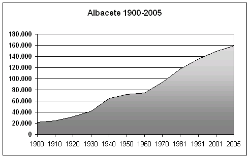 Población por decenios Albacete's population, Spain, (1900-2005). Own work, given to PD.